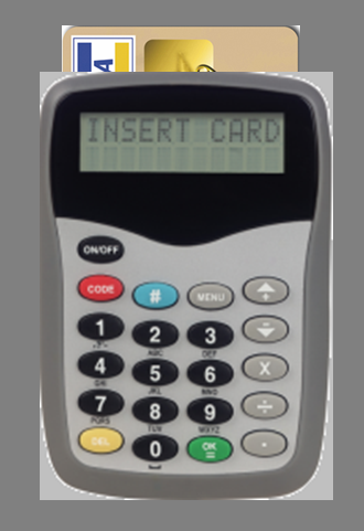 Technologie CAP